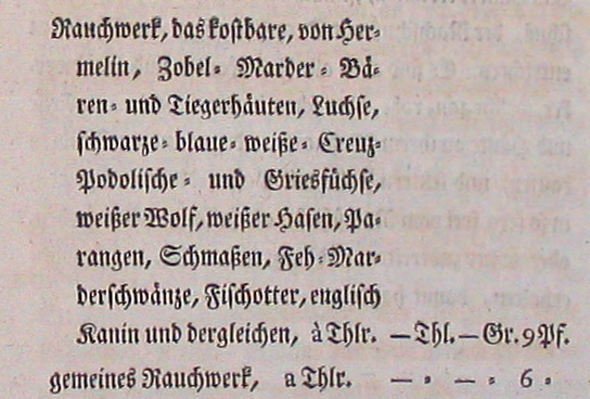 Preisedikt für Felle von 1801 (Seitenausschnitt)